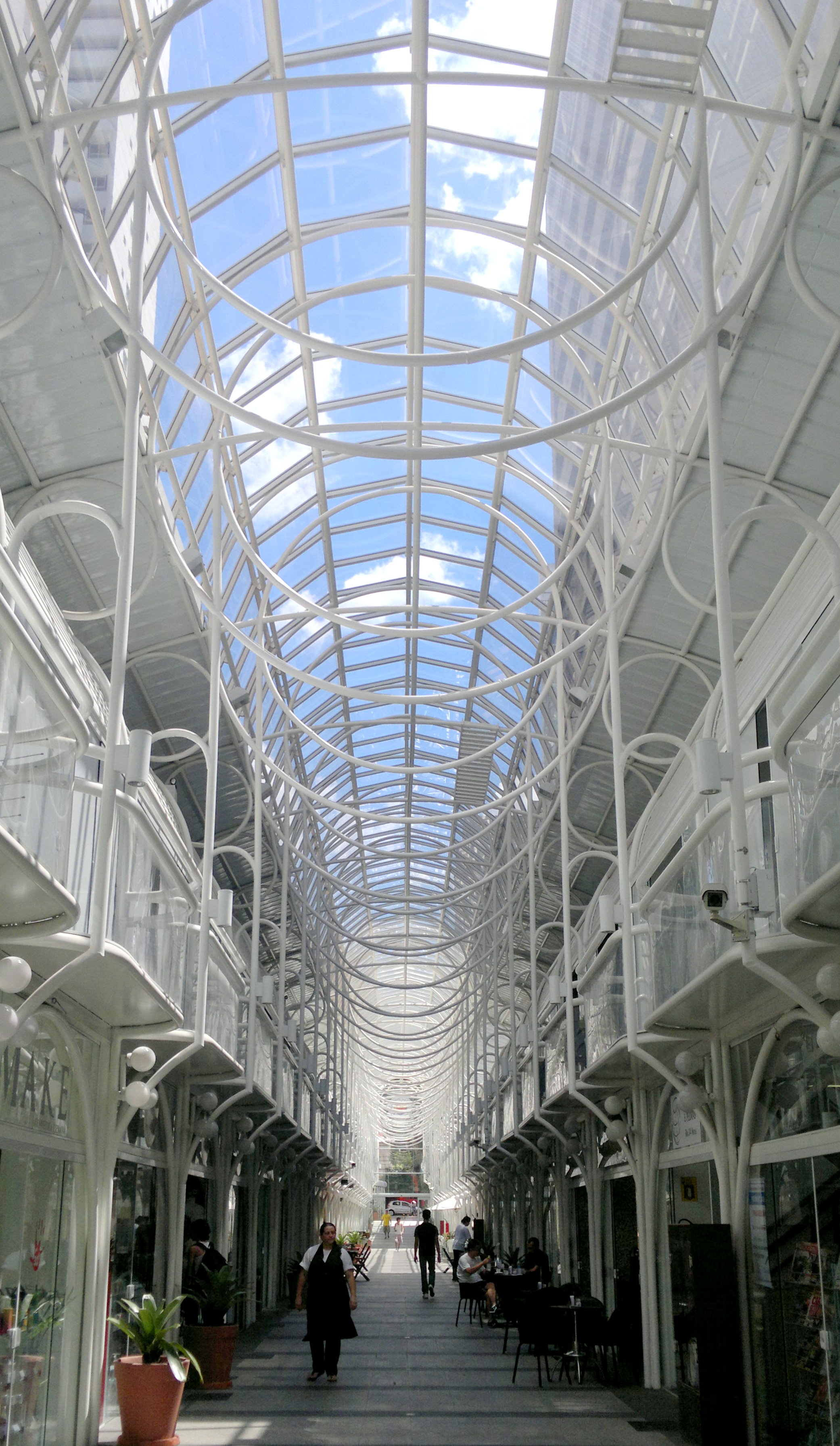 Vista interna da Rua 24 Horas, Curitiba, Paraná, Sul do Brasil.